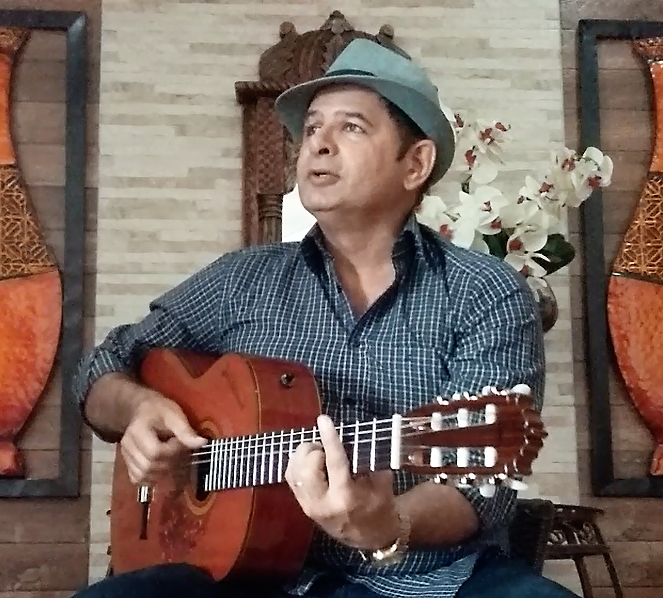 Foto de Júlio Hatchwell executando violão